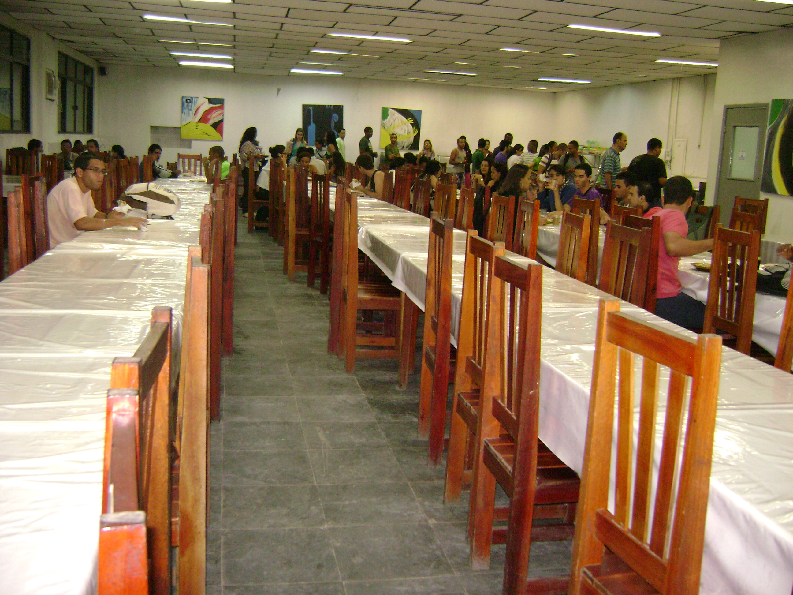 Restaurante Universitário (Bandejão) na Universidade Estadual de Feira de Santana.